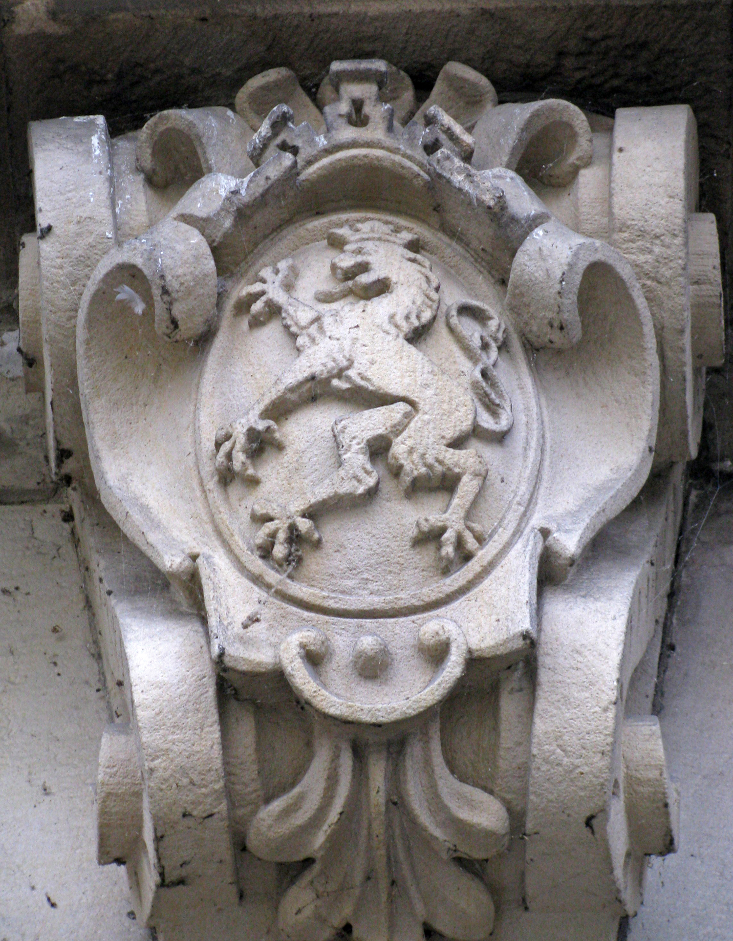 ratusz, XVI-XVIII, 1890 Kłodzko, Rynek, Kłodzko